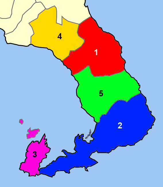 Χάρτης των ενοτήτων (και πρώην δήμων) από τις οποίες αποτελείται ο Δήμος Νοτίου Πηλίου